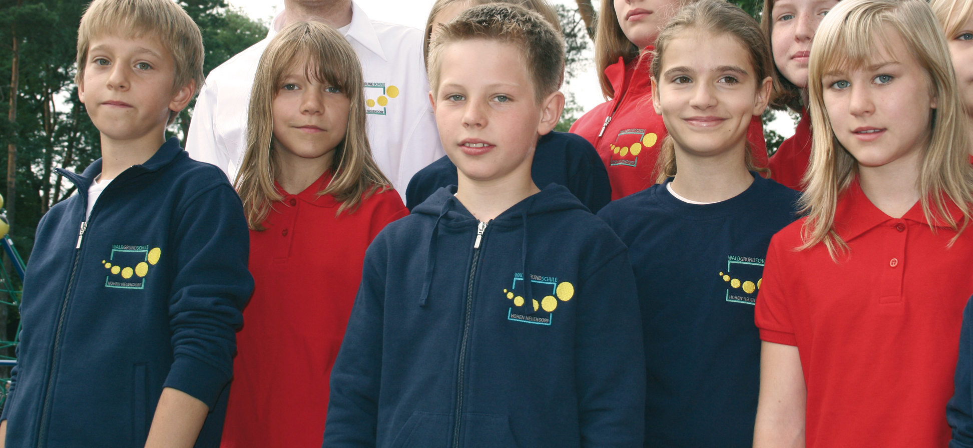 Die Waldgrundschule Hohen Neuendorf führt freiwillige Schulkleidung ein.